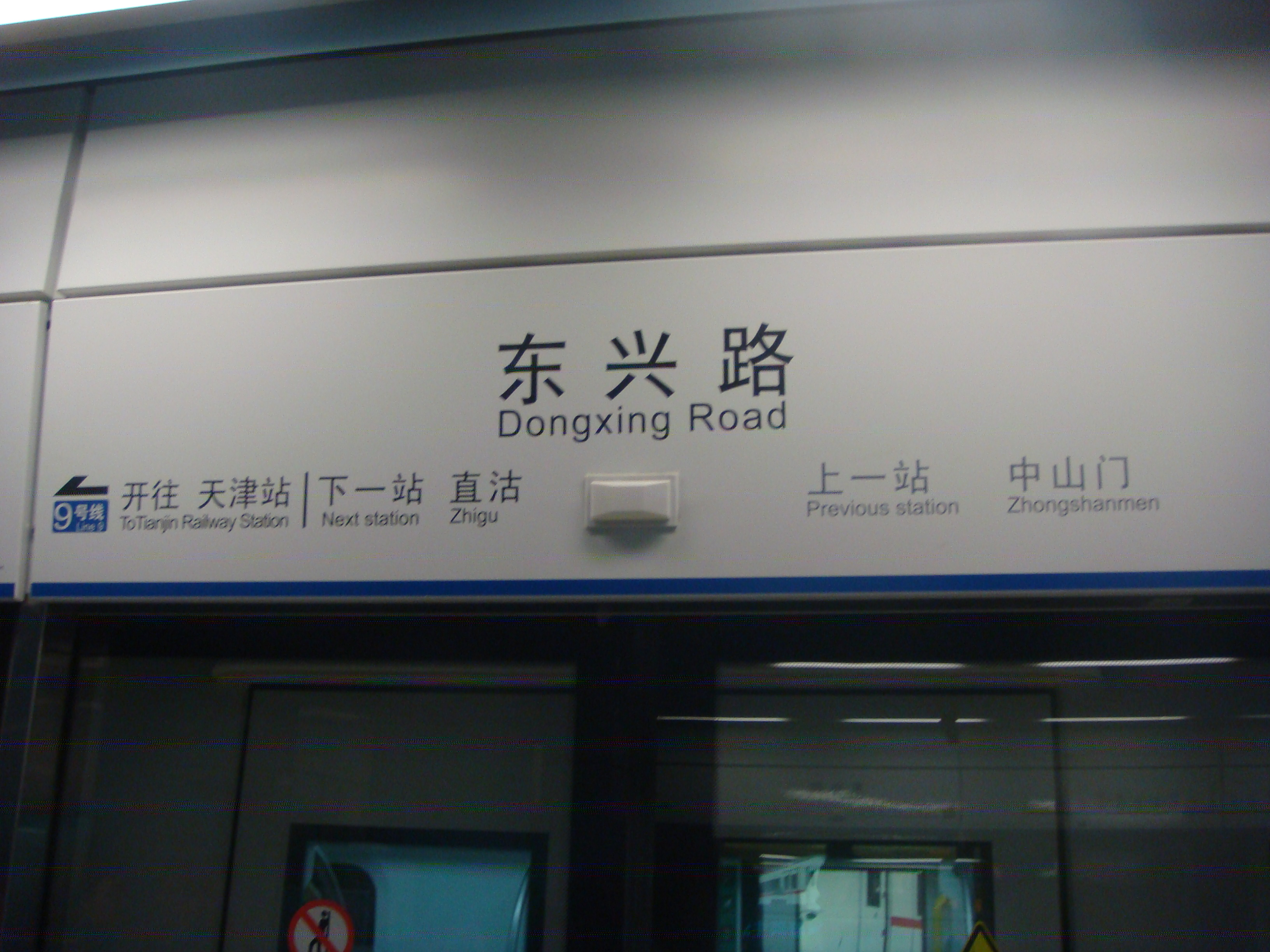 天津地铁九号线东兴路站站牌